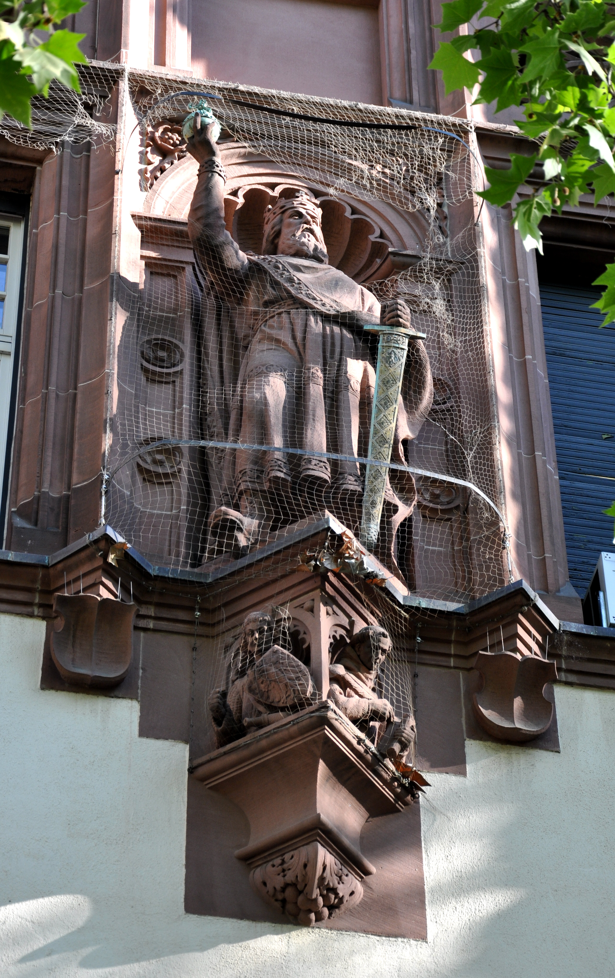 Frankfurt am Main, Neues Rathaus, Südbau, Fassade zur Limpurgergasse, Statue eines Kaisers